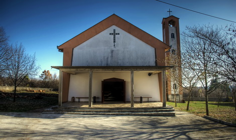 Crkva sv. Ante Padovanskog u Cerovom Docu, općina Grude